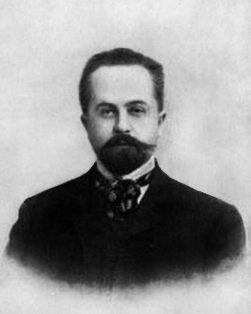 князь Владимир Анзельмович Лыщинский-Троекуров, статс-секретарь Государственного совета Российской империи.